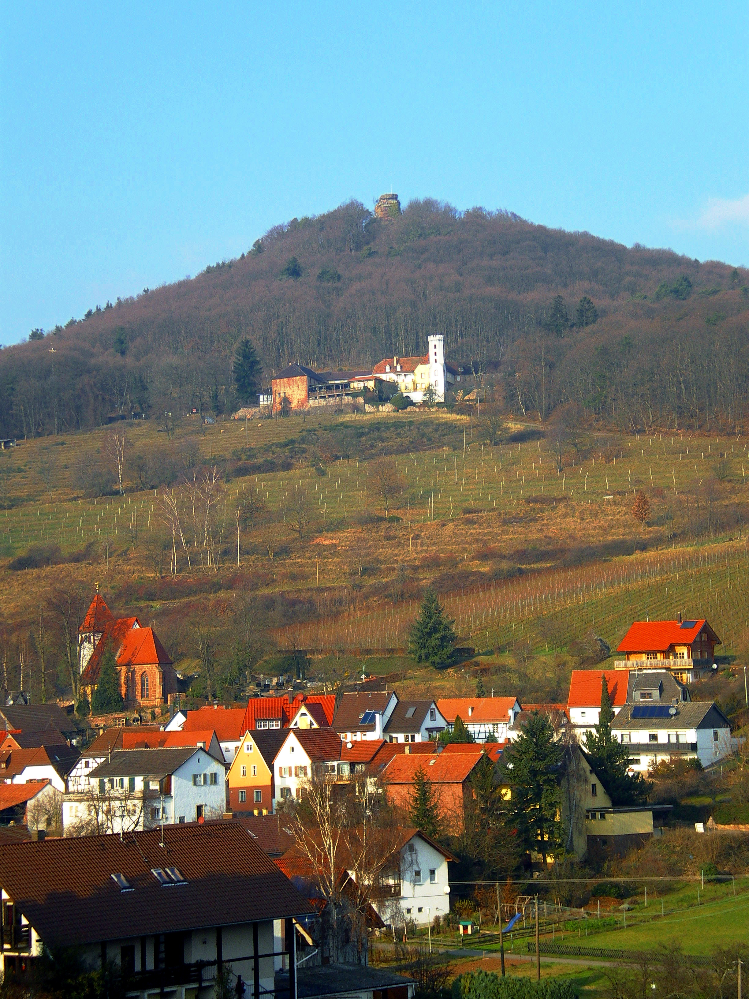 Leinsweiler, im Hintergrund Slevogthof des Malers Max Slevogt mit Aufstieg zu den Felsenresten der Burg Neukastel. Es gibt einen wunderschönen Rundwanderweg zur Madenburg über Eschbach.